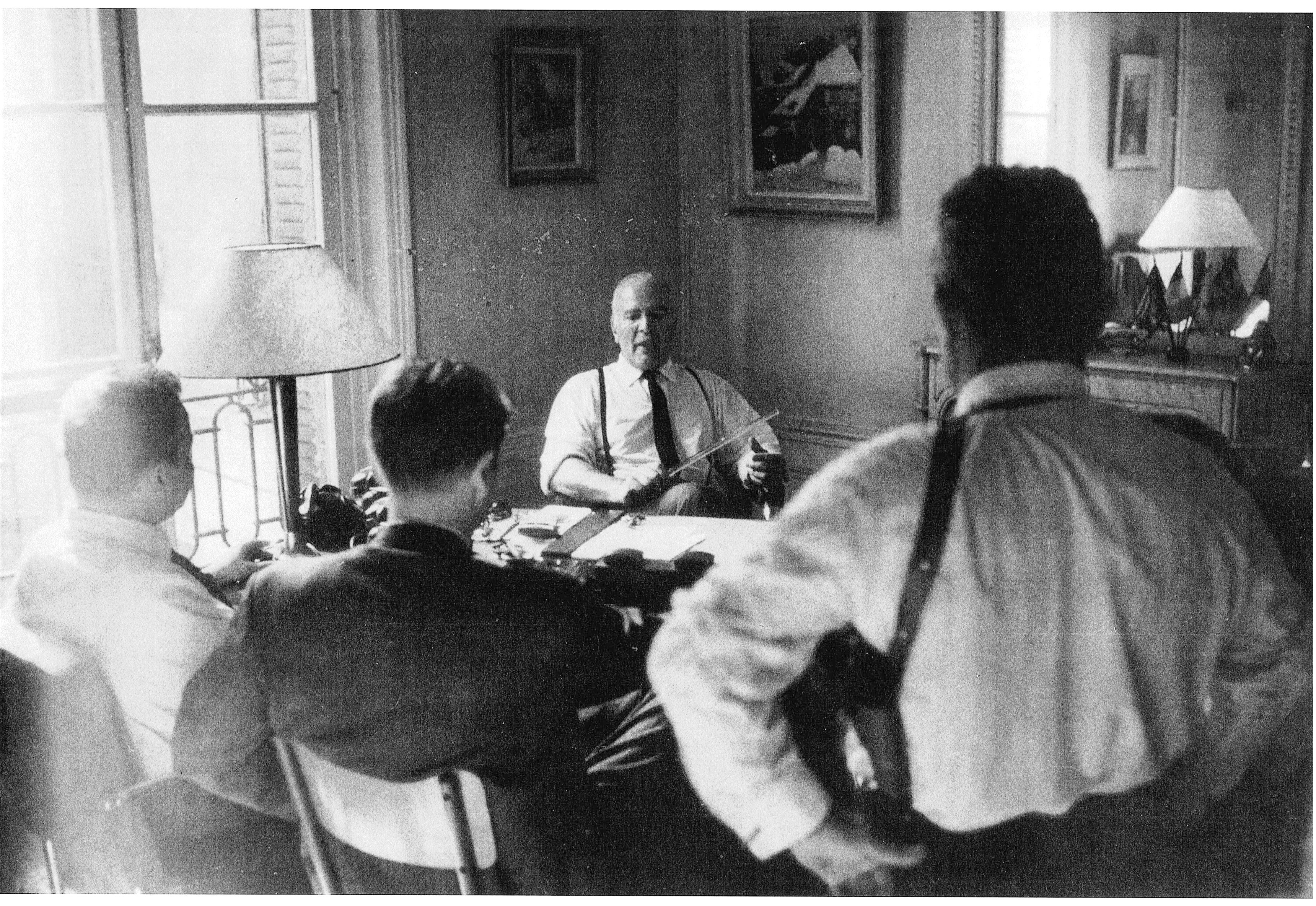 Travail personnel